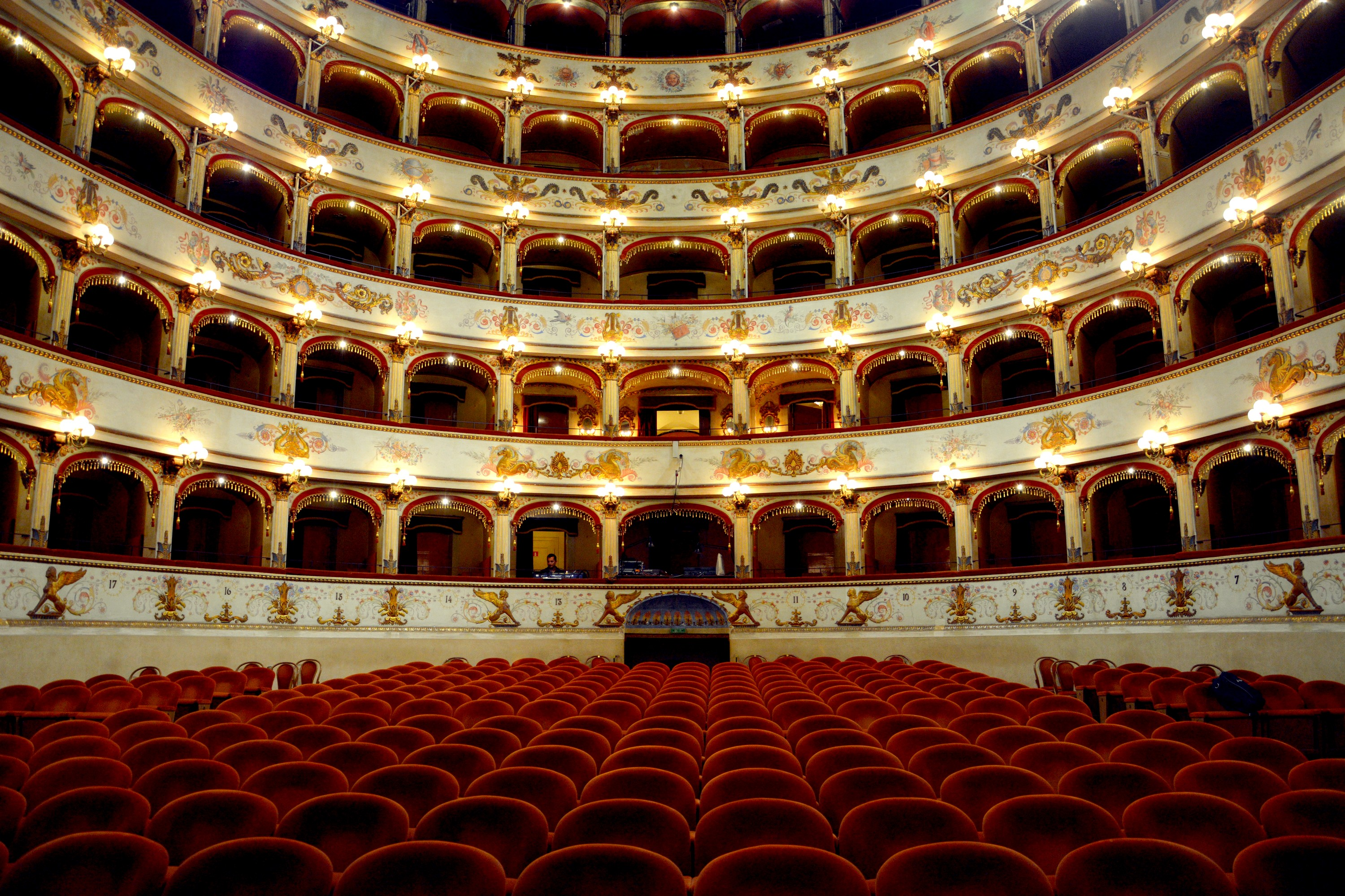 Teatro Comunale This is a photo of a monument which is part of cultural heritage of Italy.